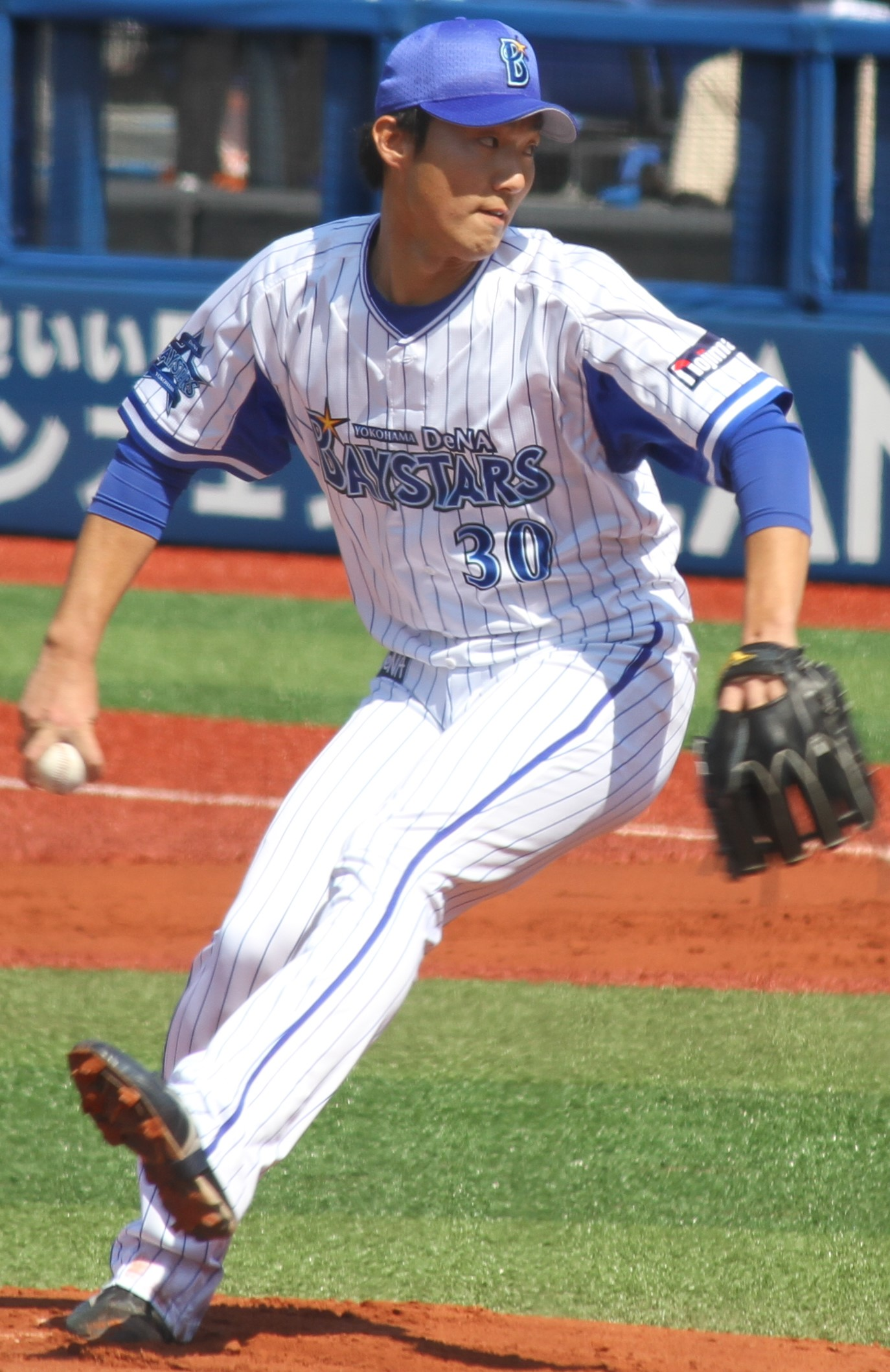 横浜DeNAベイスターズ投手の飯塚悟史。横浜スタジアムにて。